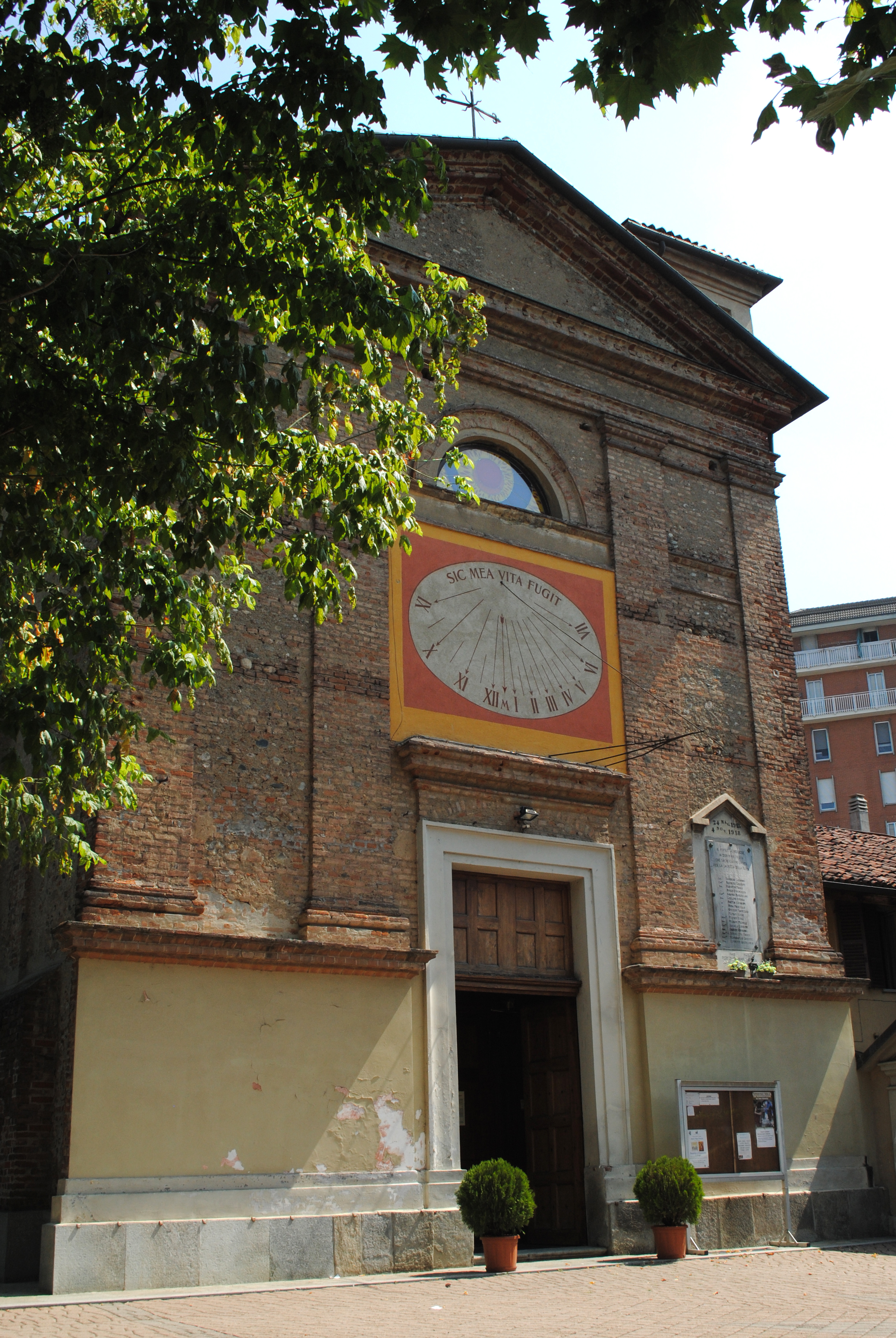 Parrocchia dello Spirito Santo